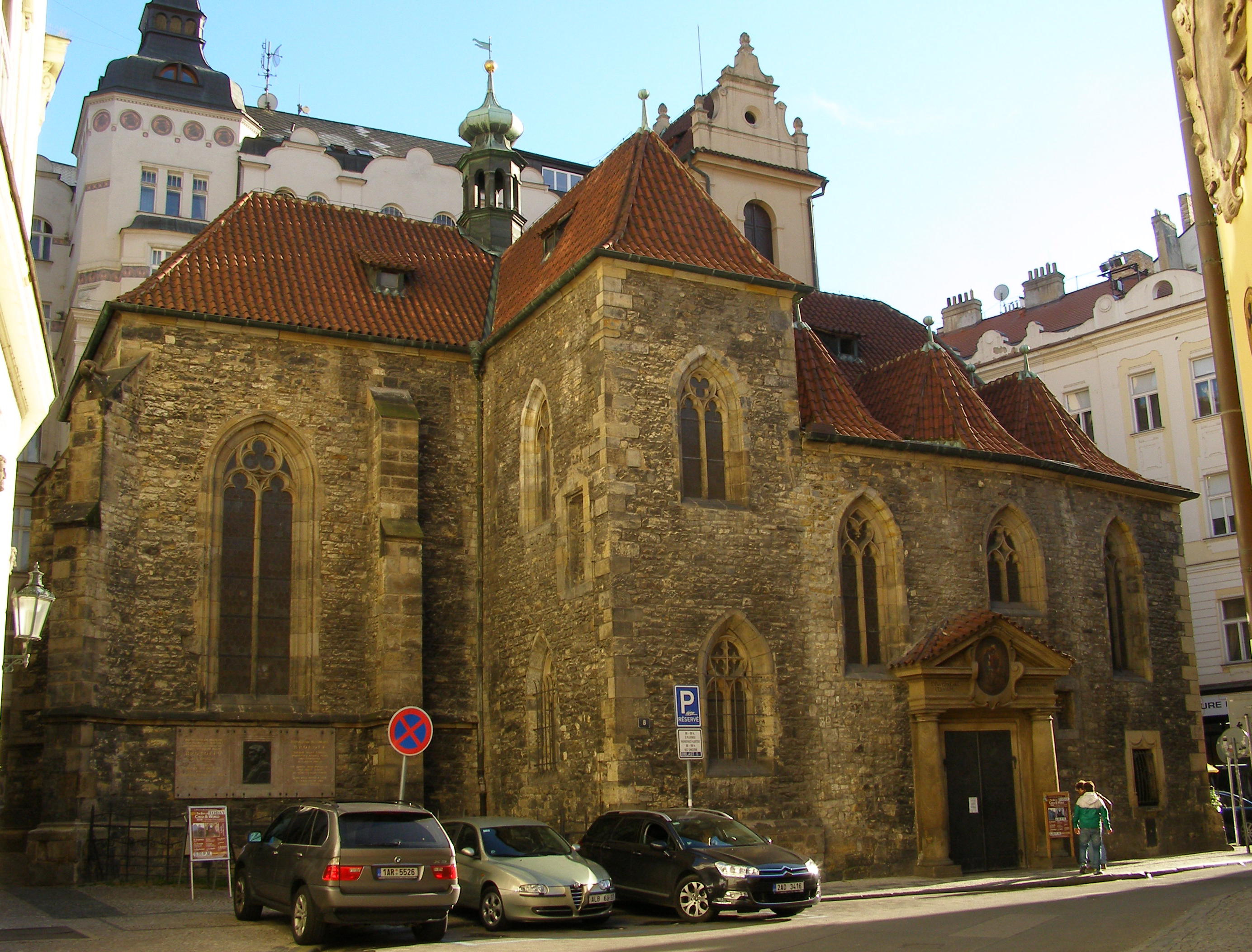 Kostel sv. Martina ve zdi (Staré Město), Praha 1, Martinská, Staré Město